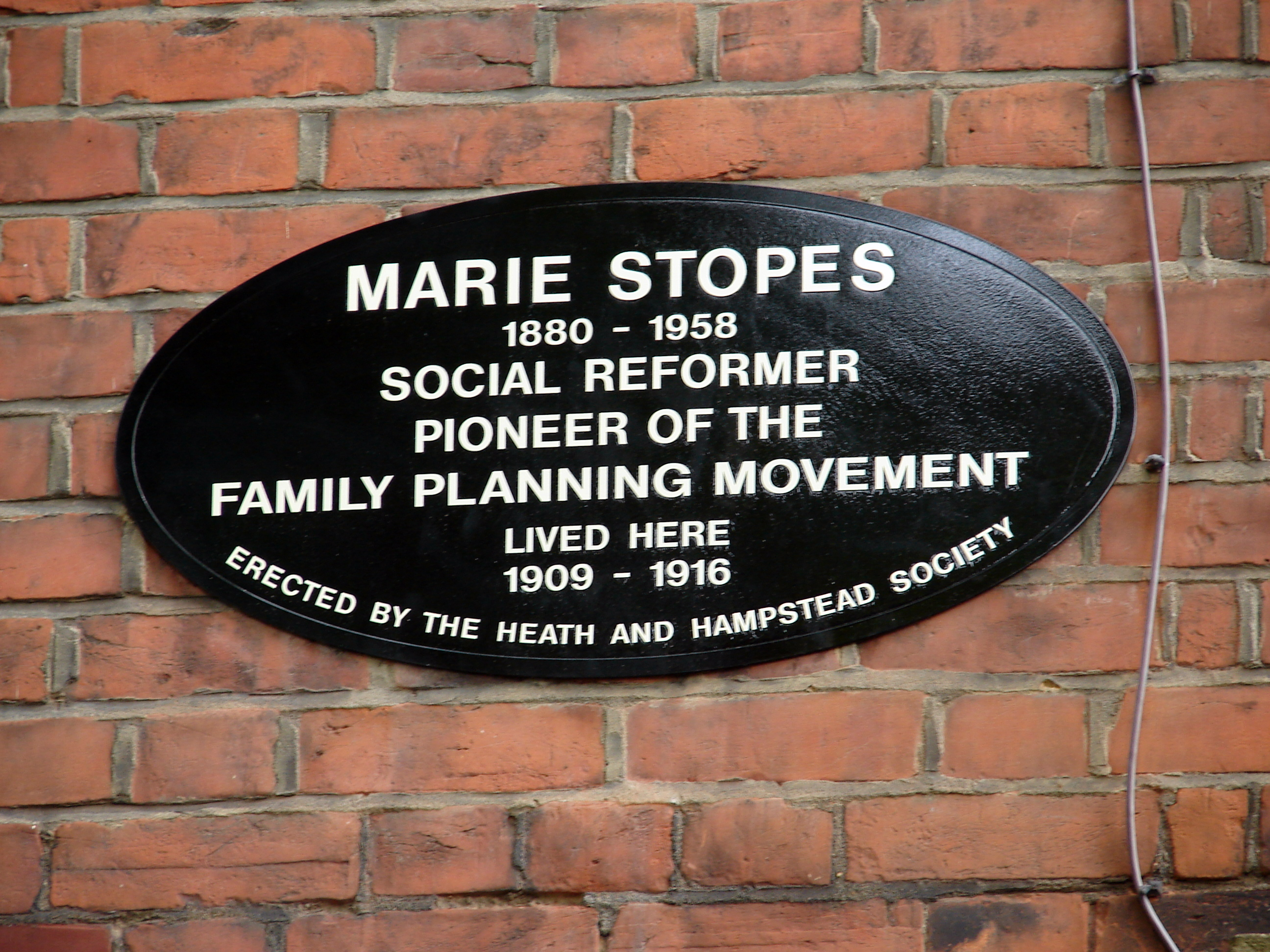 Marie Stopes